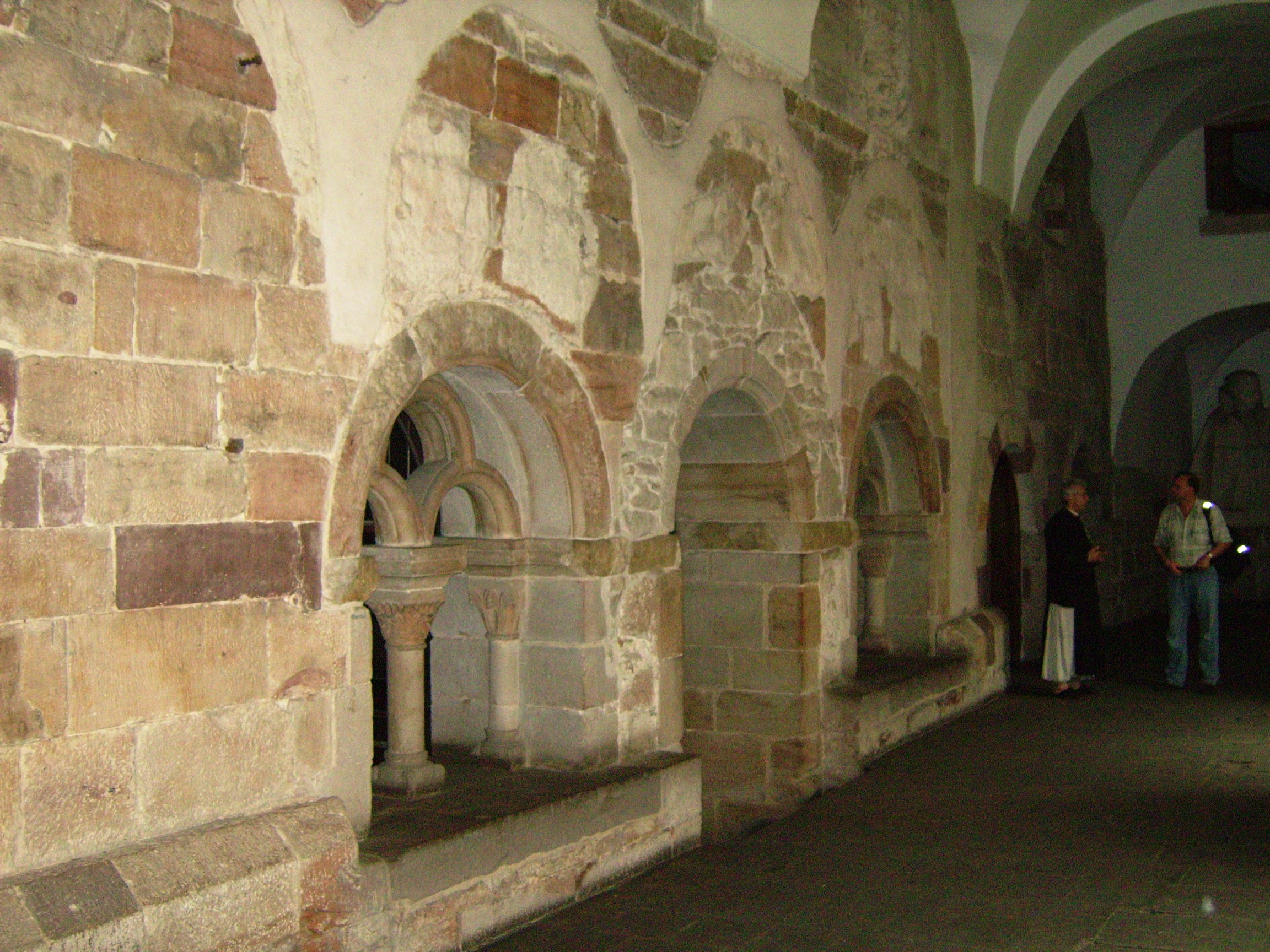 Opactwo.